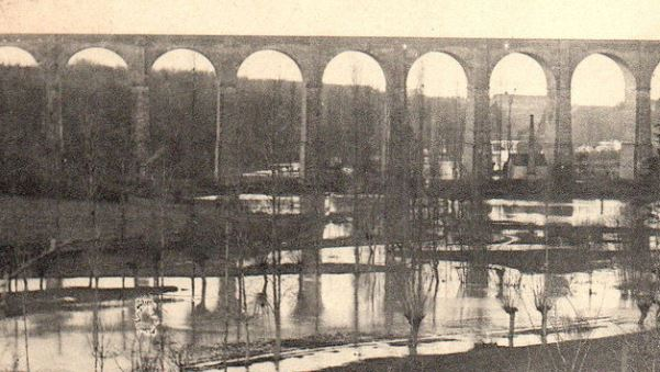 La Manse, à Saint-Epain, surplombée par le viaduc de Besnault.